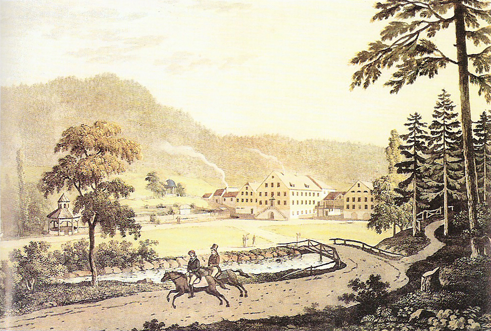 Das Niedernauer Bad (Aquatinta, 19 × 30 cm; Schefold 5703)